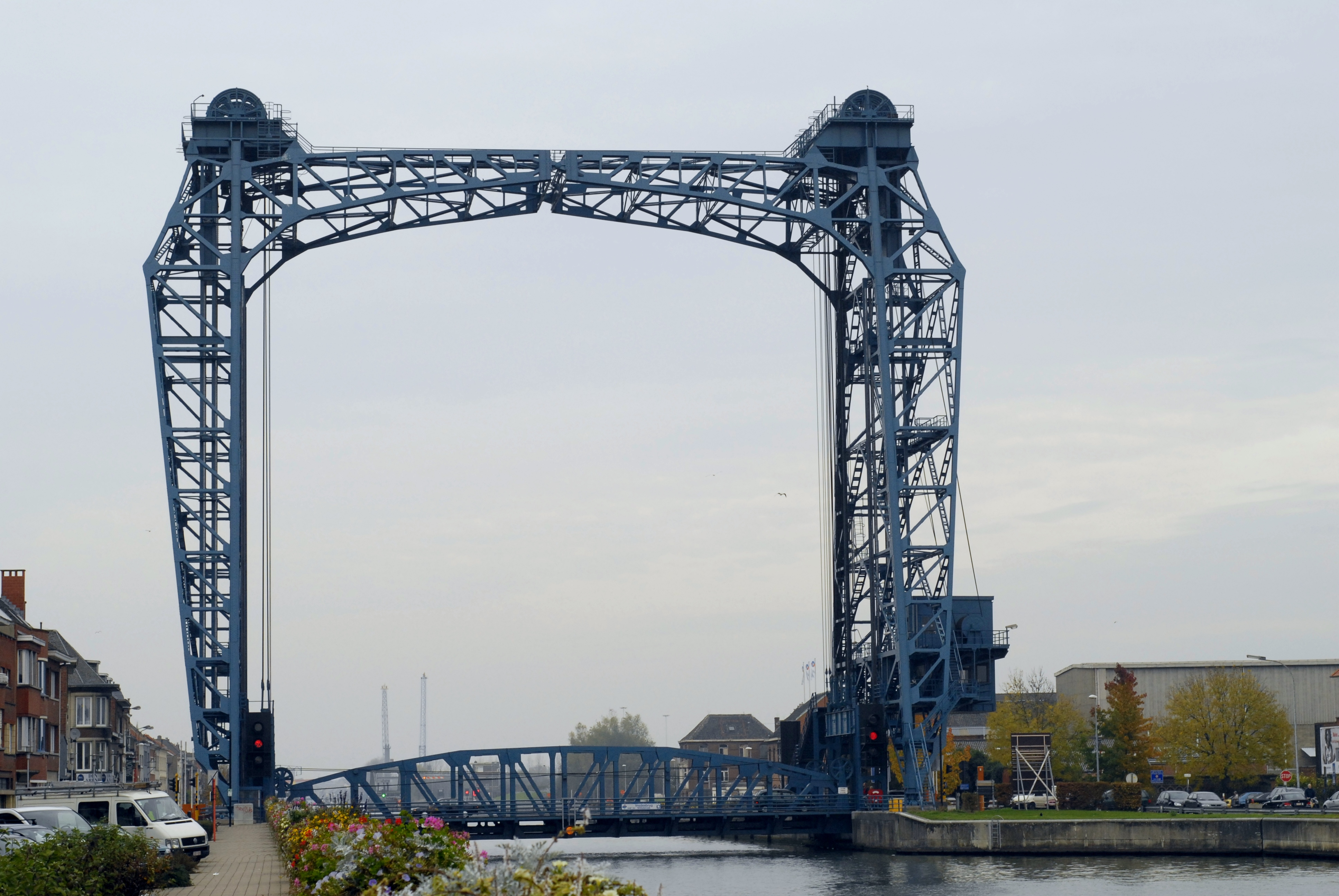 Vredesbrug in Willebroek over het Zeekanaal Brussel-Schelde